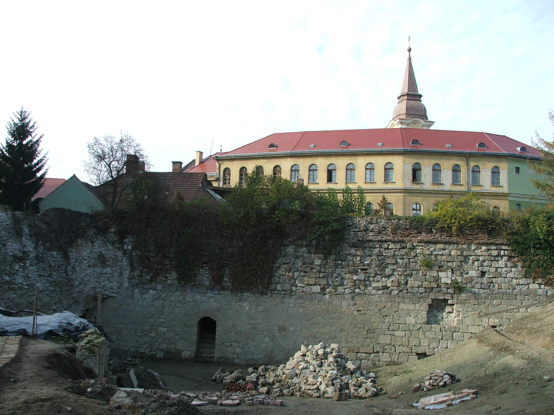 Hévízi bástya